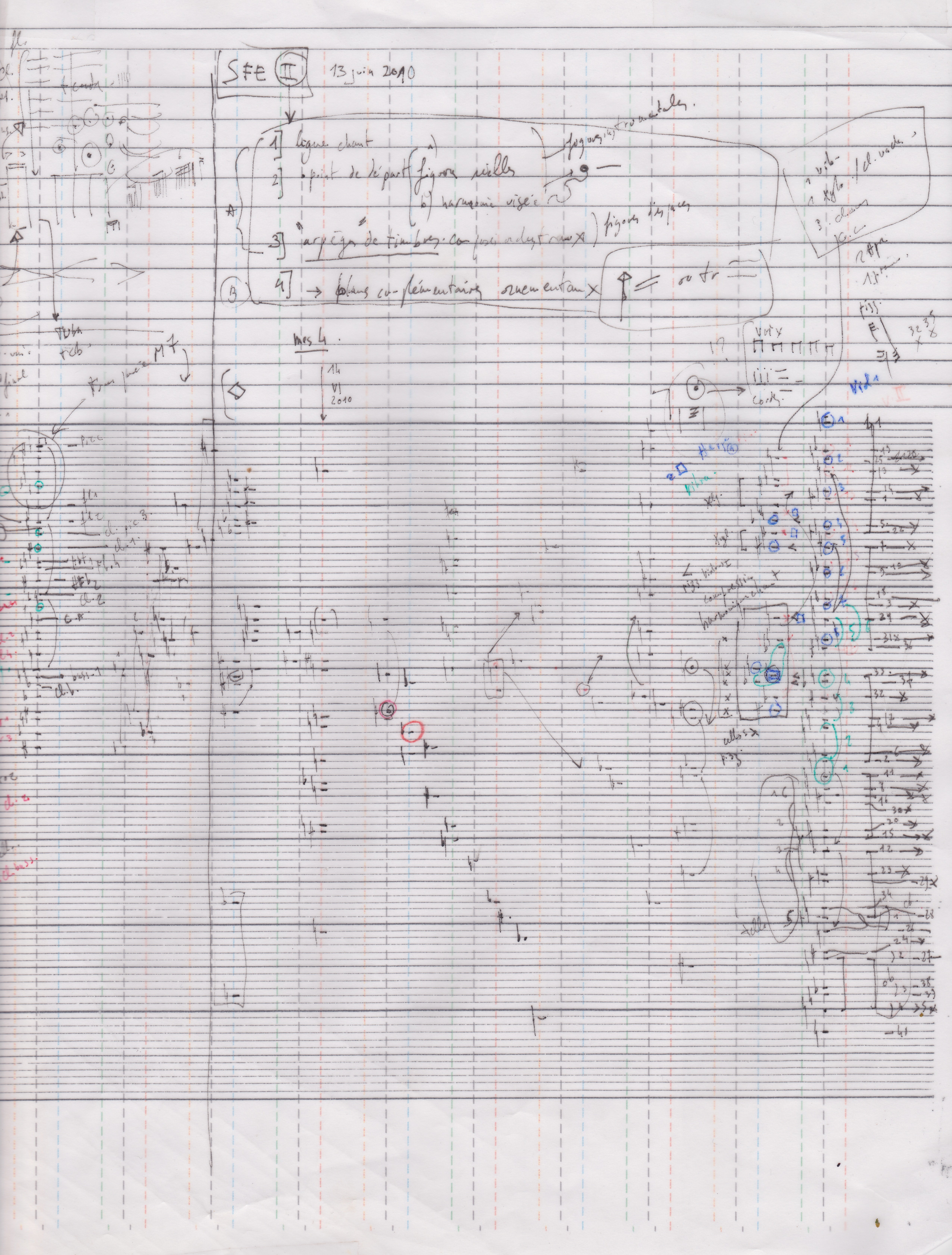 Systême d'esquisse pour micro-orchestration.